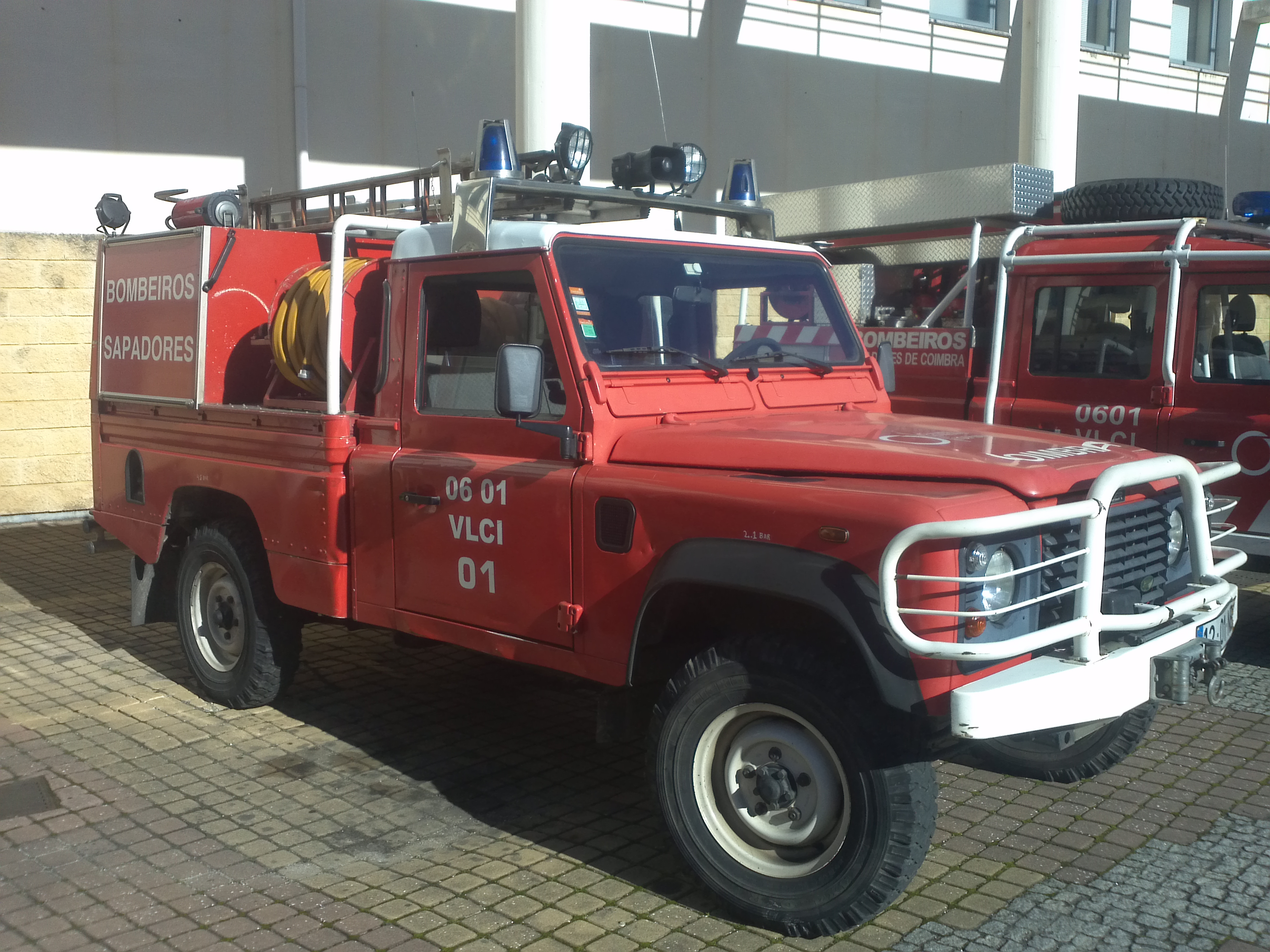 Veiculo Ligeiro Combate a Incêndios 01